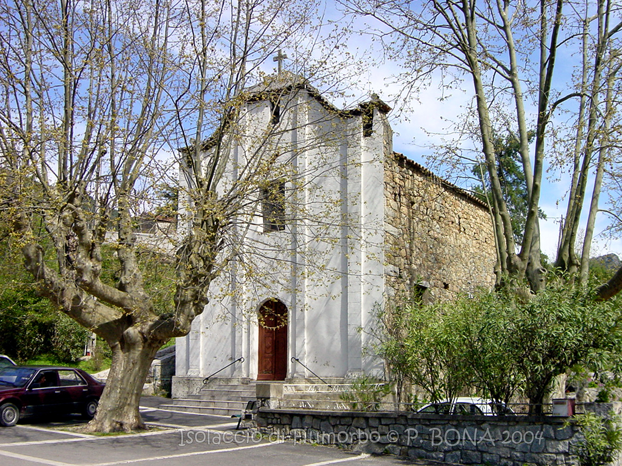 Isolaccio-di-Fiumorbo, Fiumorbu (Corse) - Église de Pietrapola